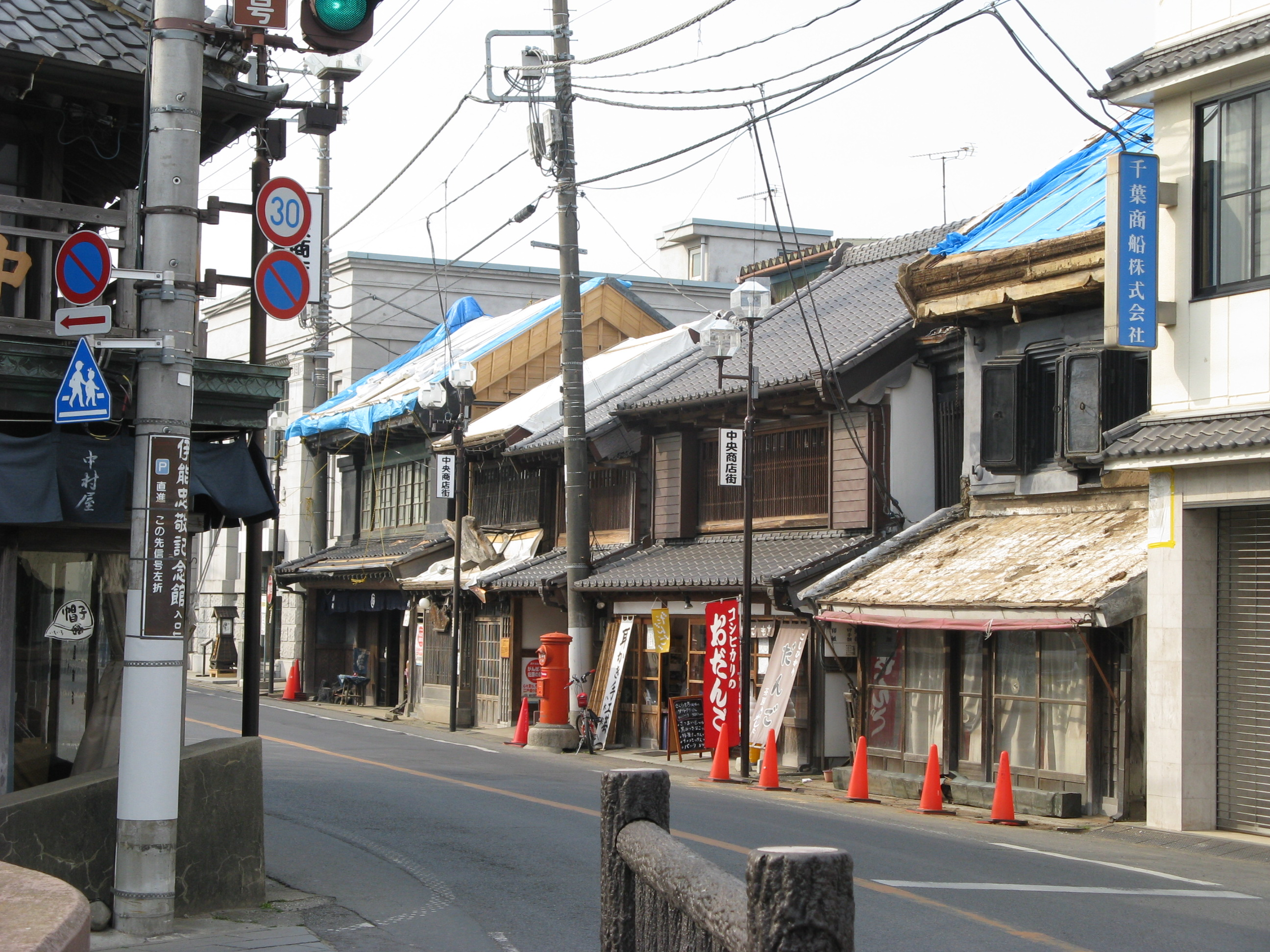 東日本大震災後（2011年4月2日）の香取街道沿いの店舗